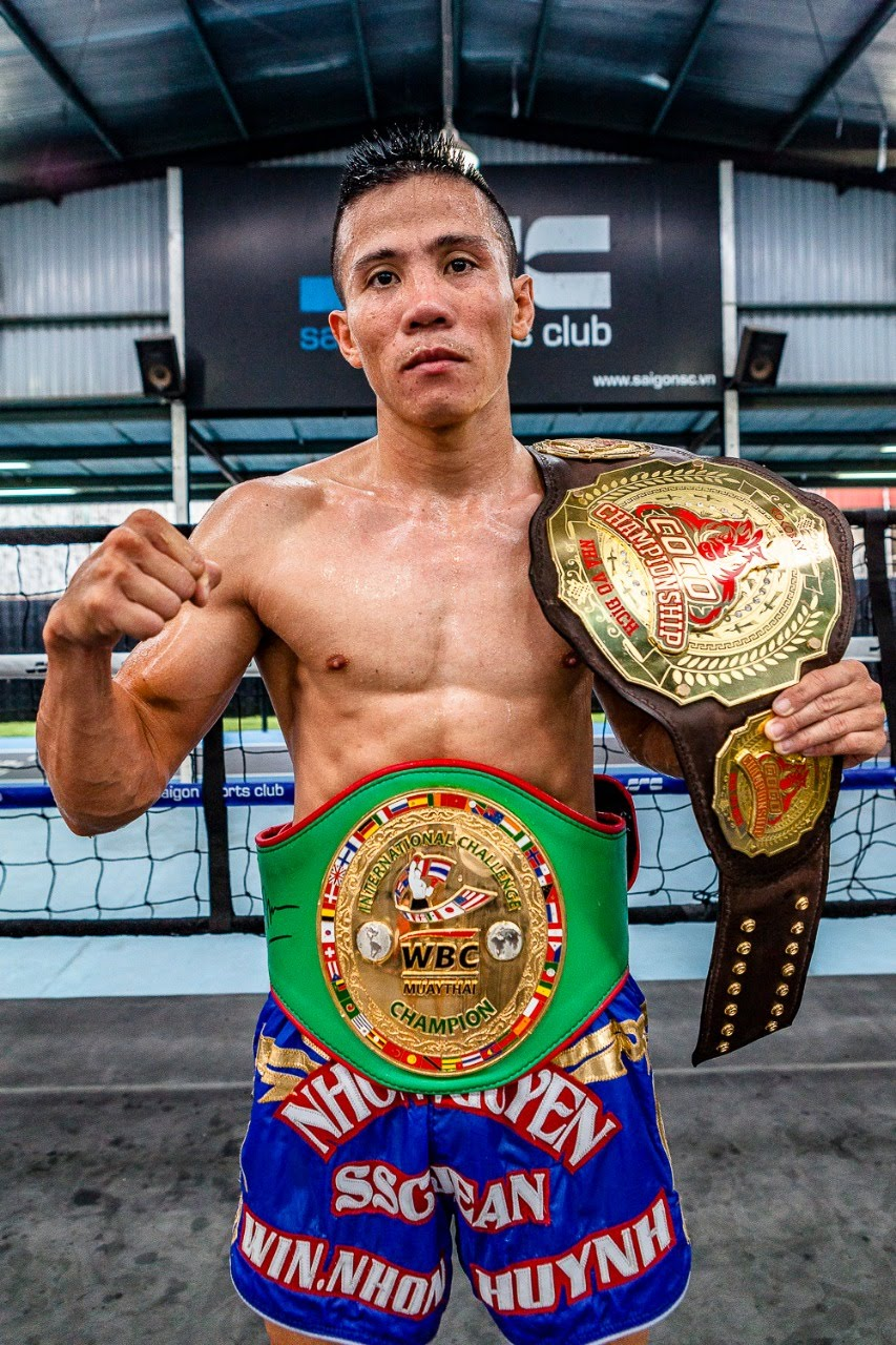 Ảnh võ sĩ chuyên nghiệp Nguyễn Kế Nhơn mang đai vô địch WBC Muay Thái thế giới và đai vô địch Coco Championship.